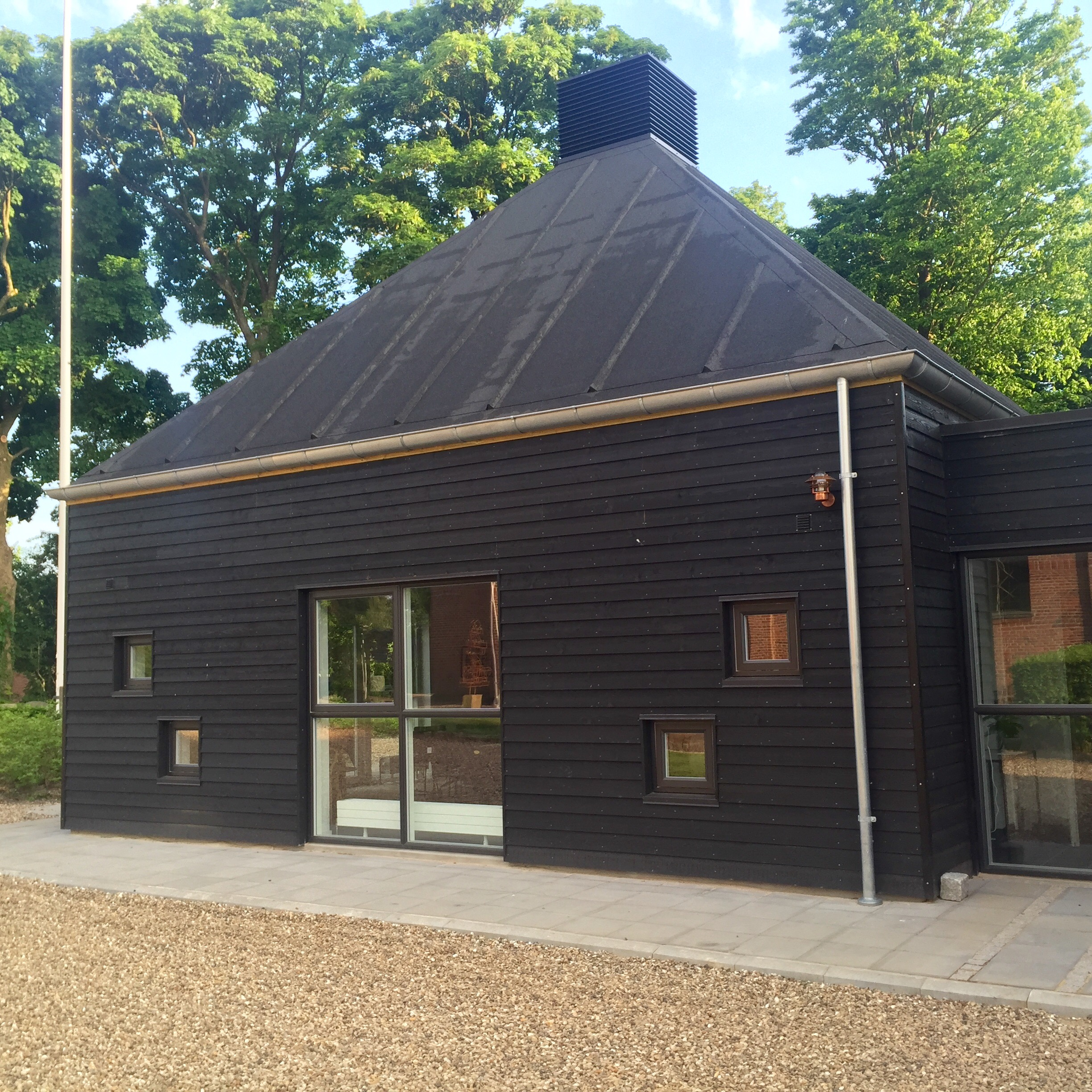 Brückerstuen - et lokalt samlingssted